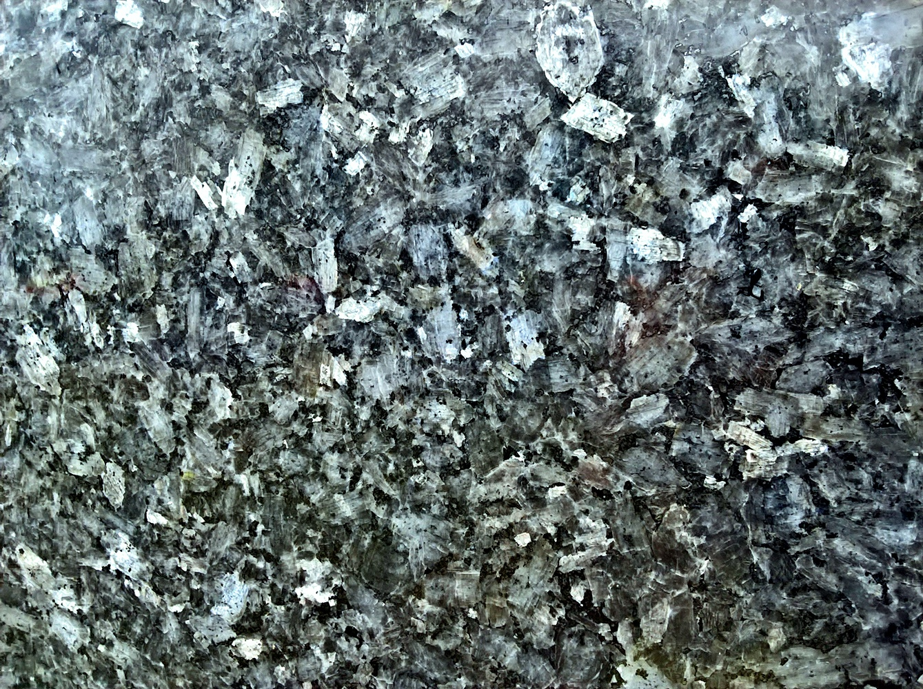 Wielkość dużych kryształów labradoru to około 3-4 cm